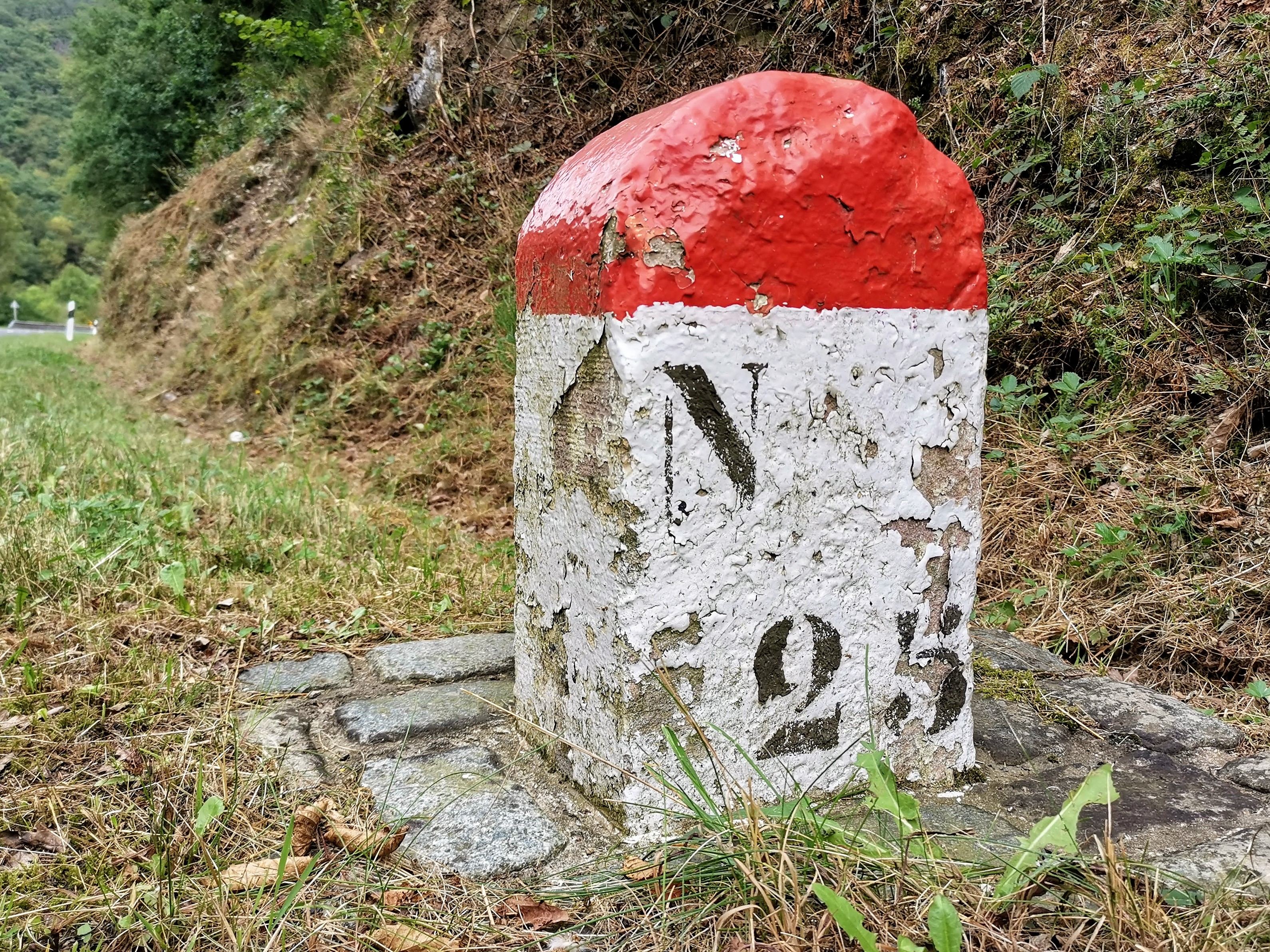 Borne kilométrique N25 entre Kautenbach et Wiltz, section cadastrale de Nocher.